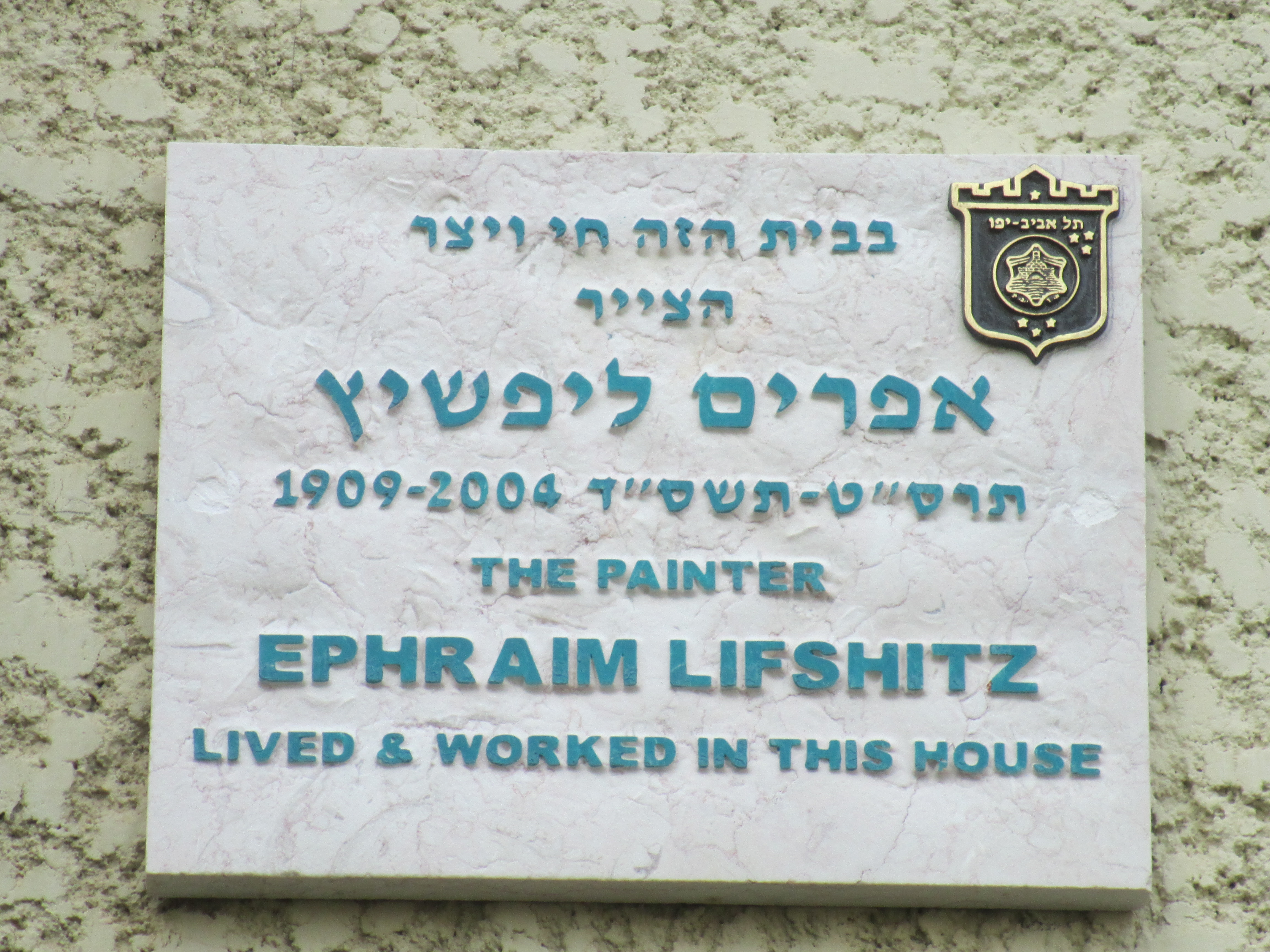 לוחית זיכרון לצייר אפרים ליפשיץ ברחוב ארלוזורוב 8 בתל אביב